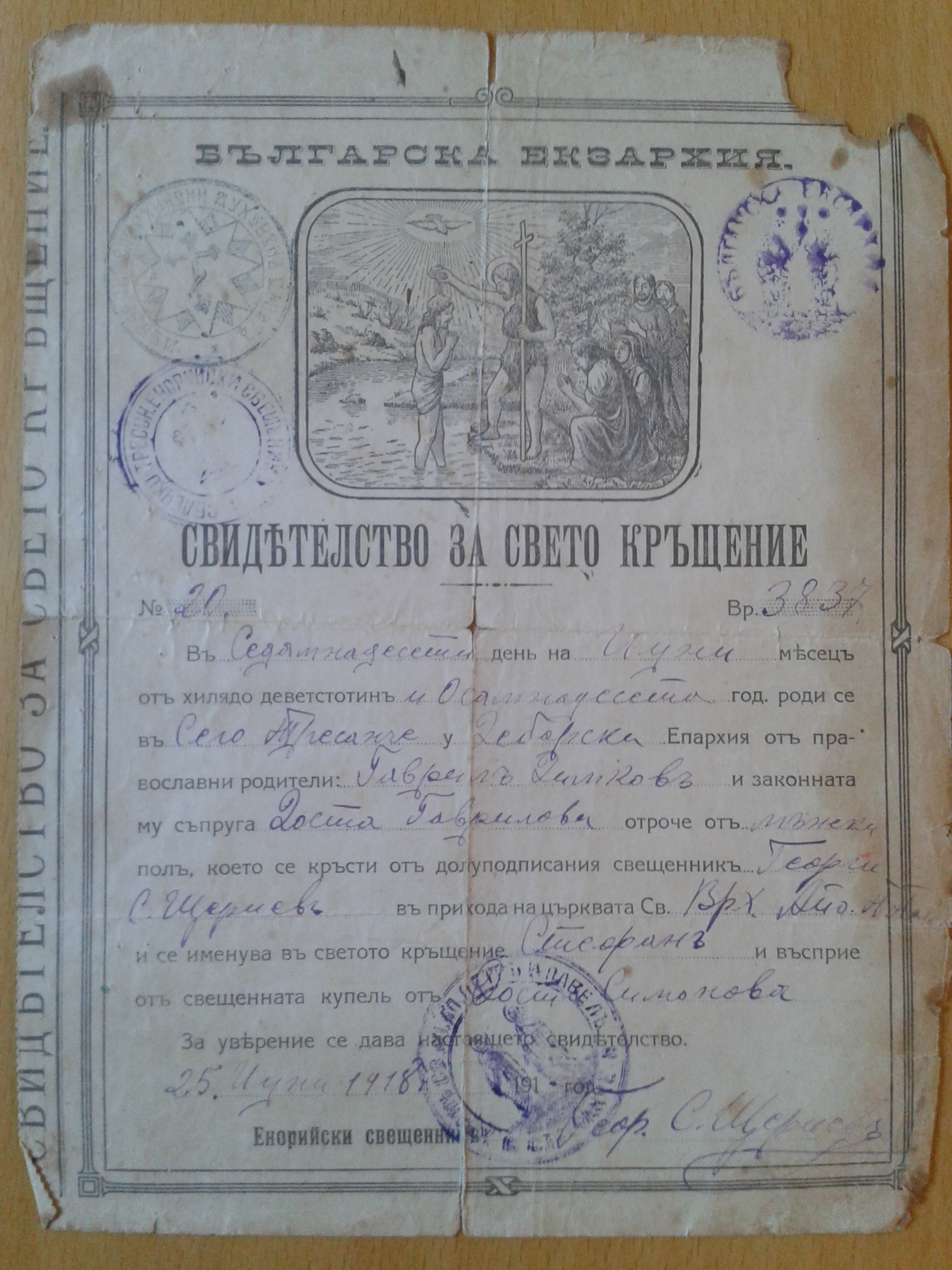 Кръщелно свидетелство на Стефан Димков от Тресанче, Дебърска епархия